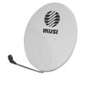 Antena Offset.Categoría:antena